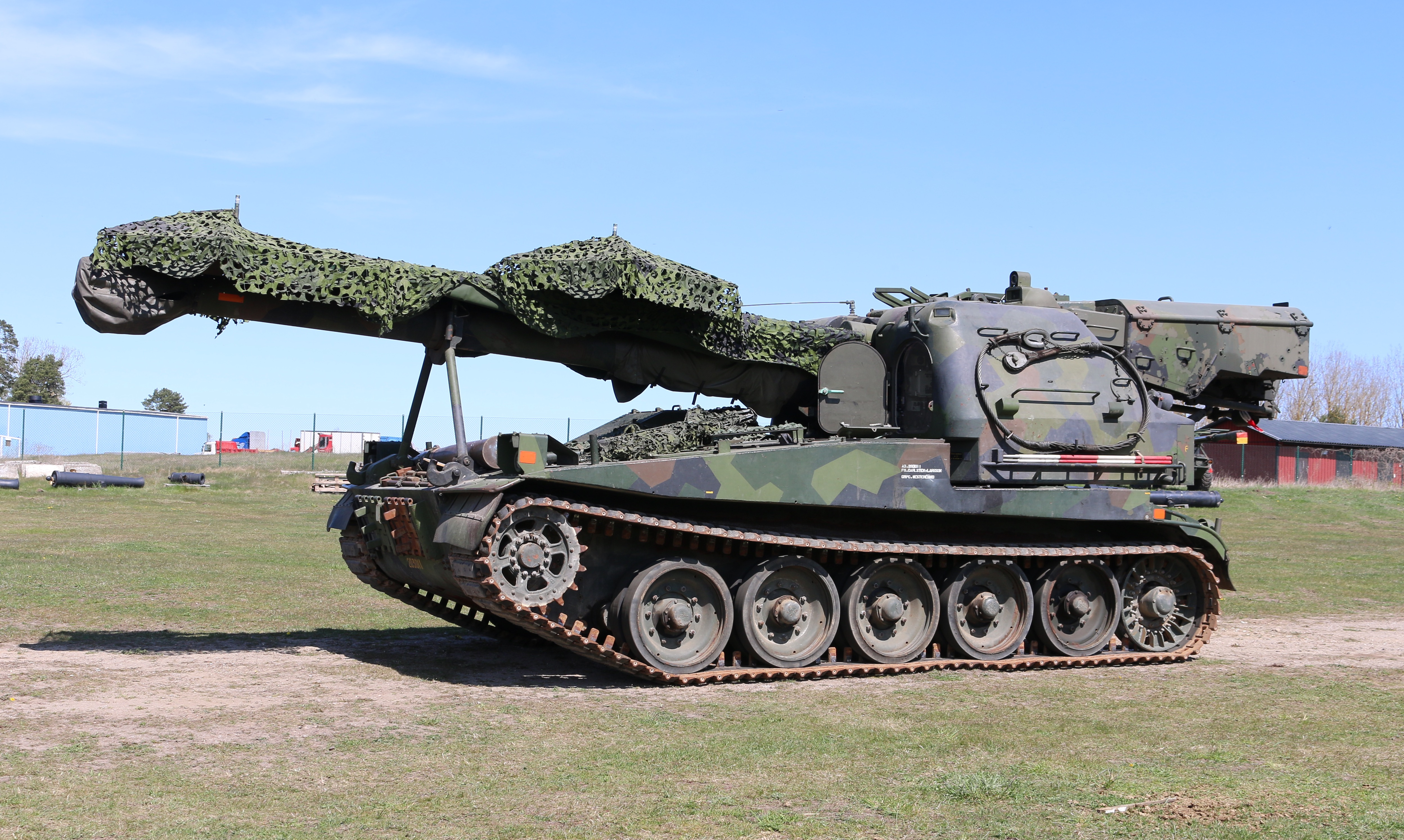 Bandkanon 1 Artillerimuseet 2017